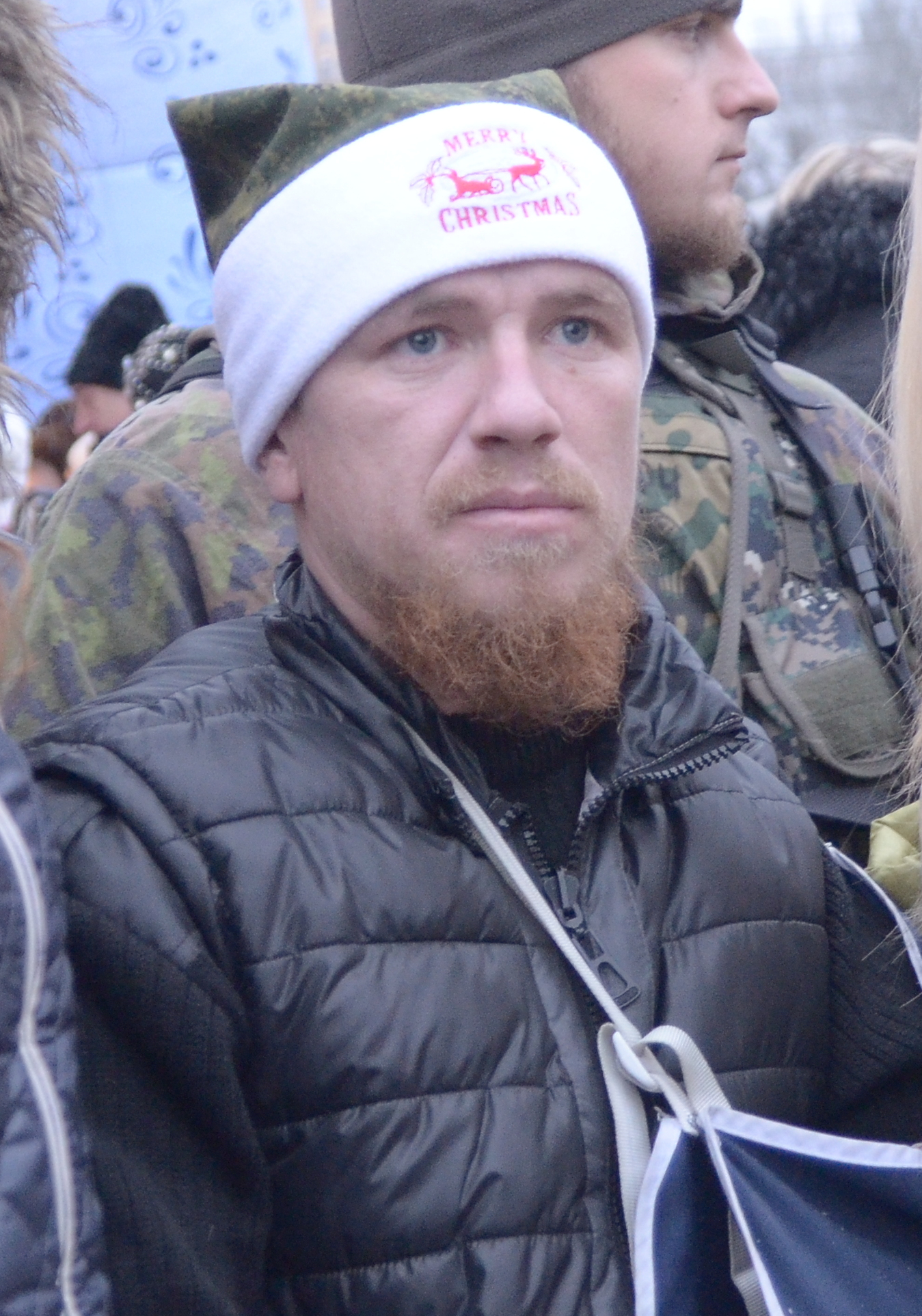 Открытие новогодней ёлки в Донецке